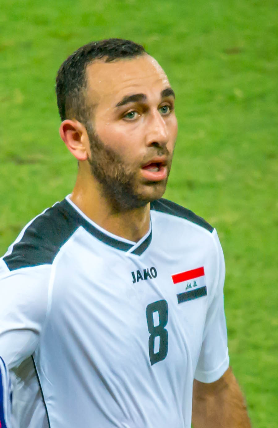 Japan vs Iraq AFC Asian Cup